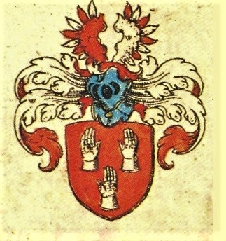 Herb Elbel